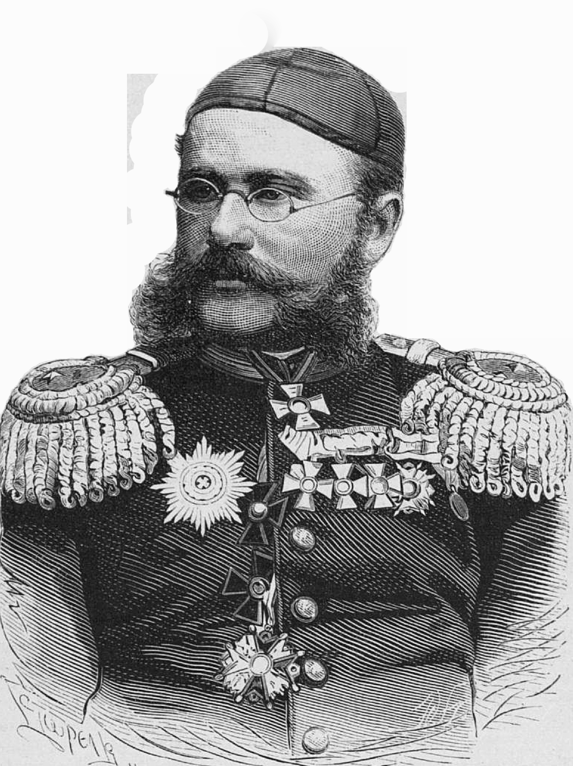 Генерал Абрамов Александр Константинович. Данное изображение было использовано в «Военной энциклопедии» изданной книгоиздательским товариществом Ивана Дмитриевича Сытина. Санкт-Петербург); 1911—1915 гг. в статье «Абрамов, Александр Константинович»